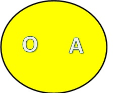 En el mecanismo de la confluencia O representa al organismo y A al ambiente